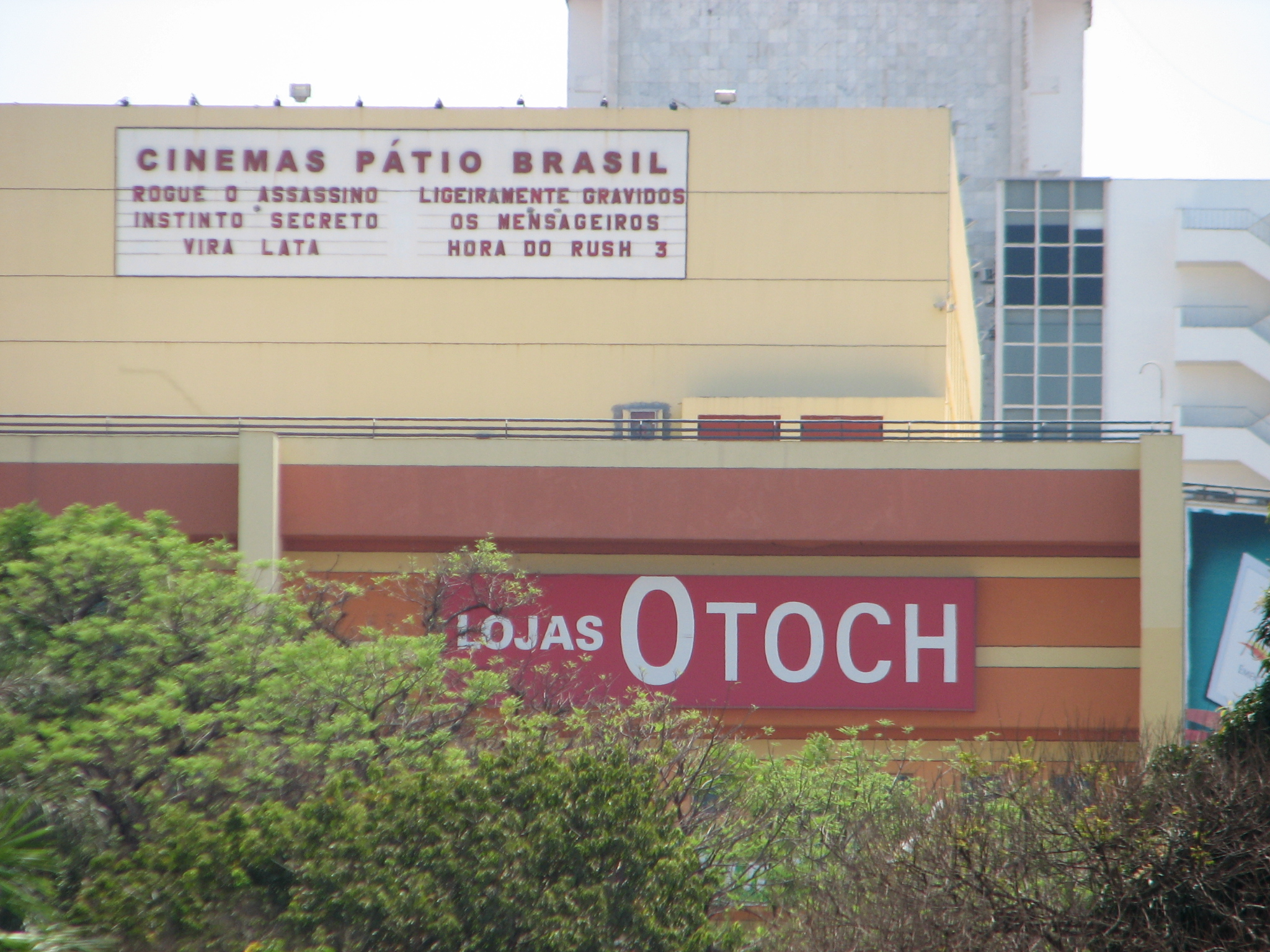 Pátio Brasil, a Shopping Center in Brasília, Brazil